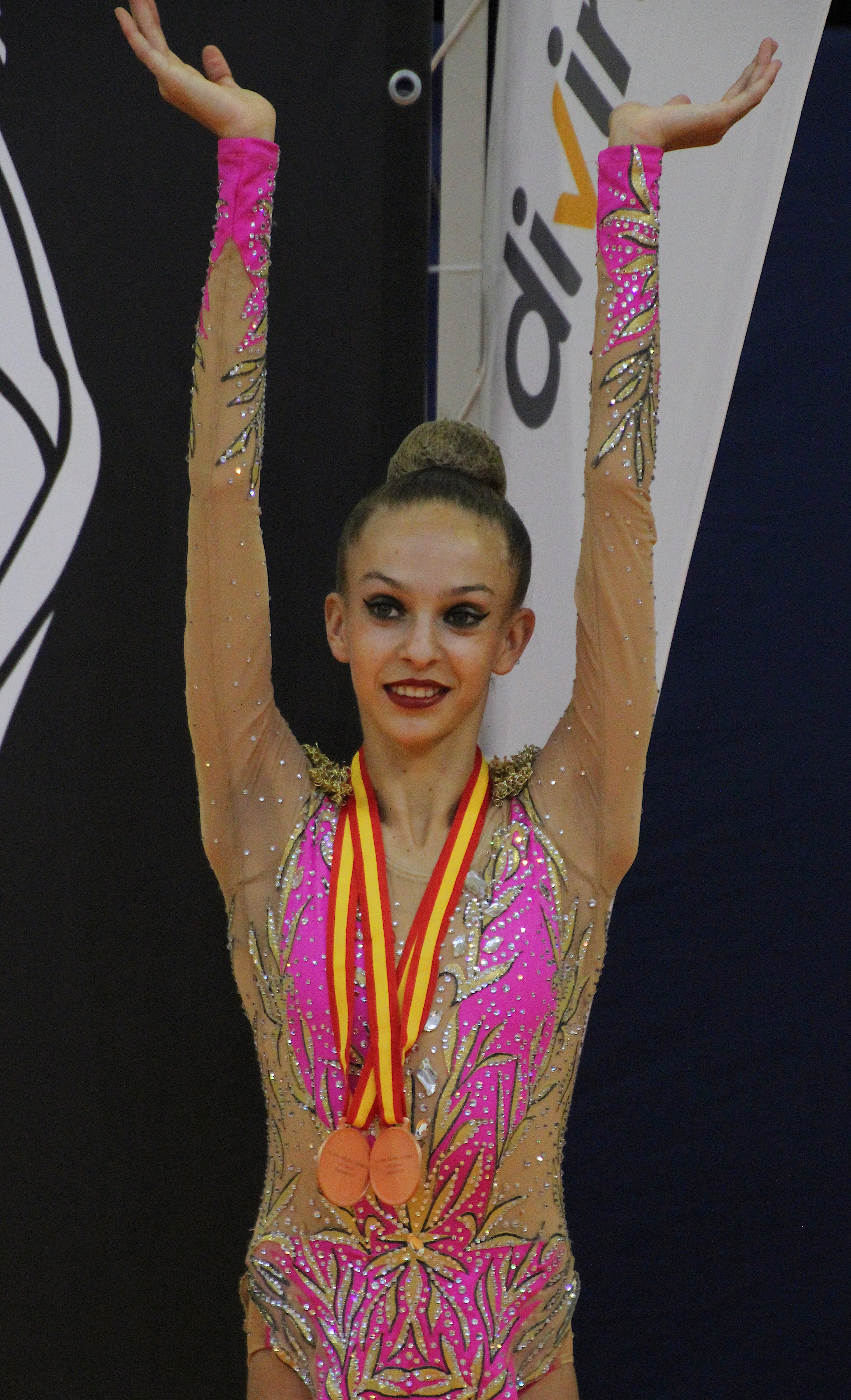 La gimnasta Nerea Moreno con los bronces en mazas y en cinta en categoría sénior en el Campeonato de España Individual en Guadalajara en junio de 2018.